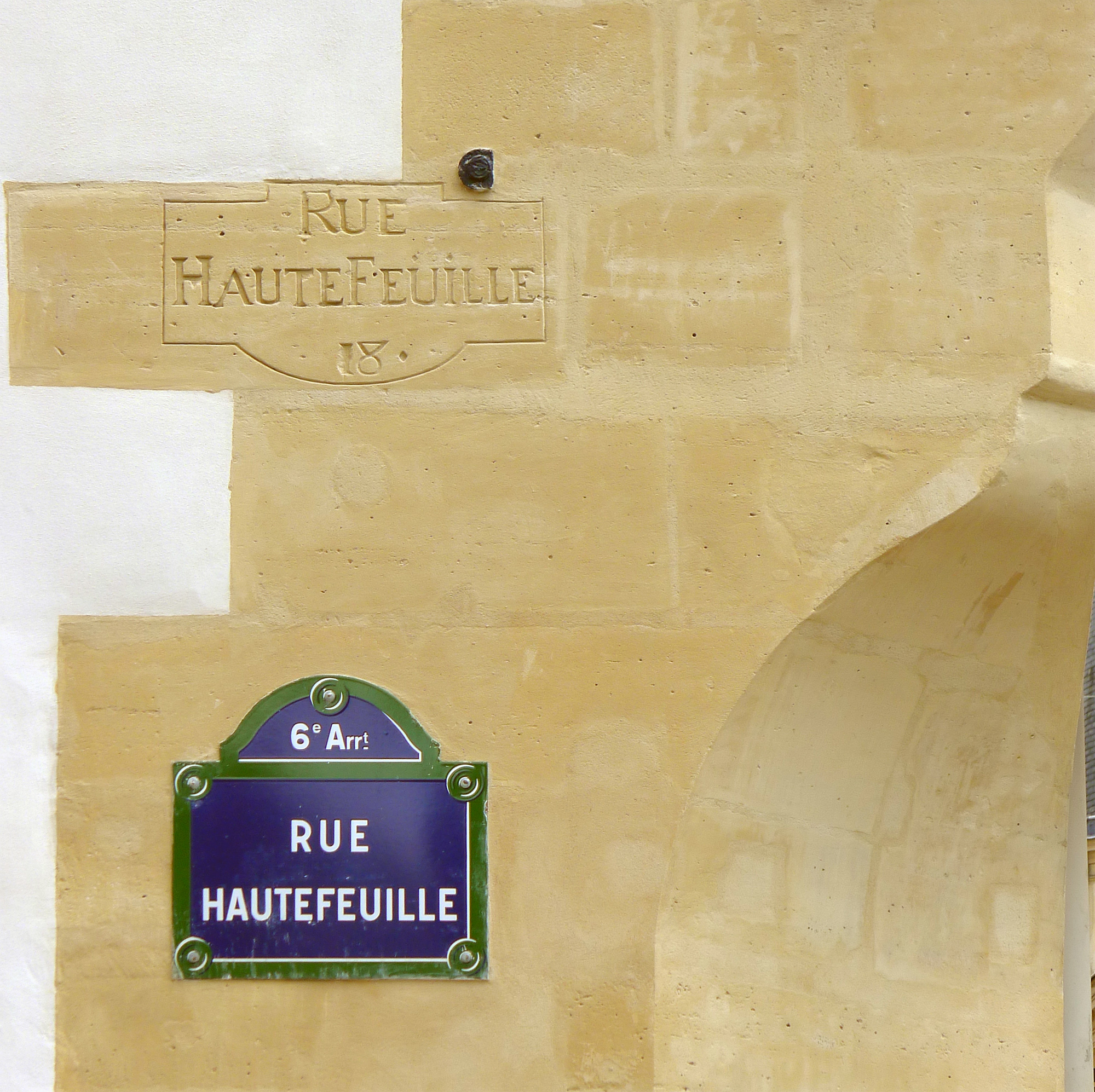 Rue Hautefeuille (plaque et inscription ; angle de rue) - Paris VI